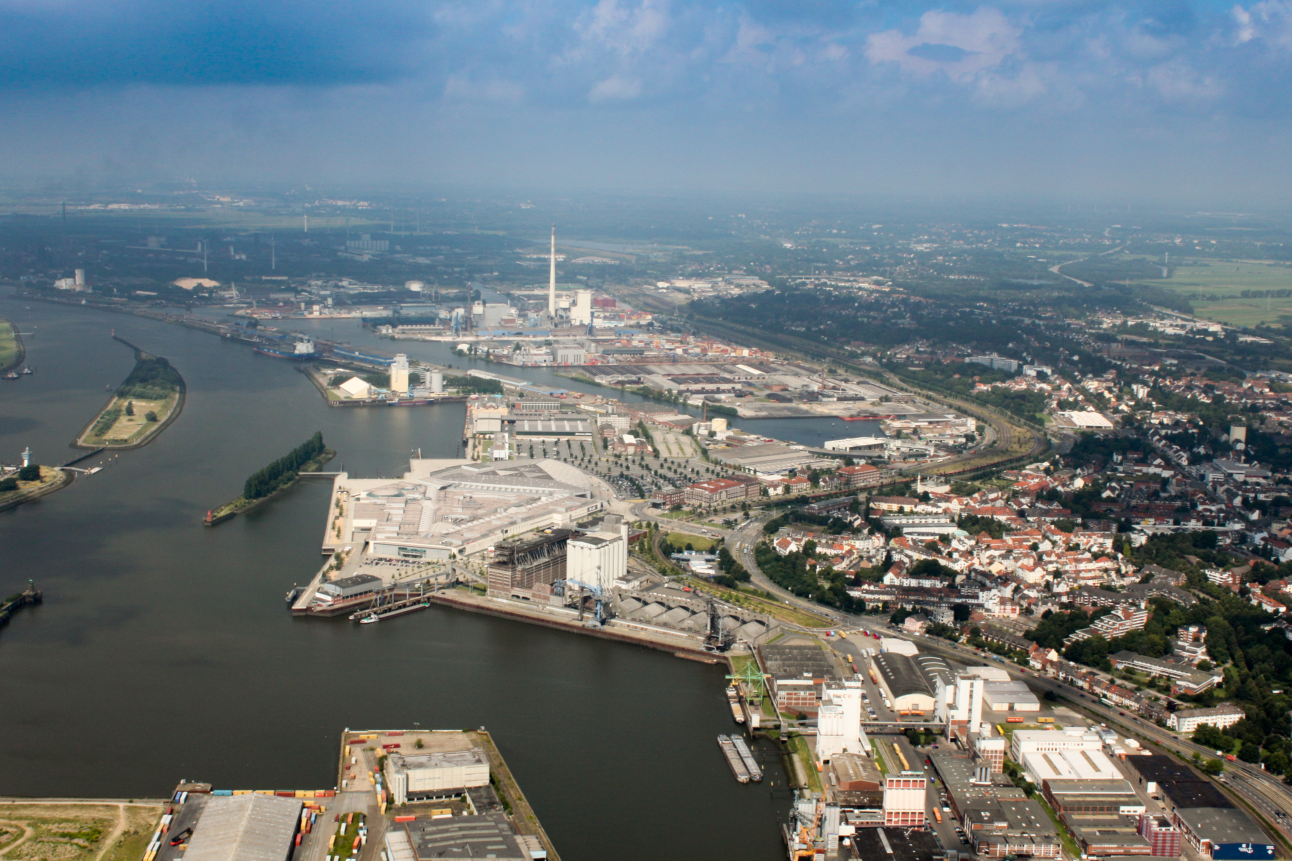 Lufbilder Bremen: Häfen, JVA Oslebshausen, Ohlendorf, Lindenhof, Überseestadt, Becks, Kellogs, St. Stephanis Kirche, Hauptbahnhof, Weser (identische Bildbeschreibung für File:2012-08-08-fotoflug-bremen zweiter flug 1142.JPG bis File:2012-08-08-fotoflug-bremen zweiter flug 1244.JPG; alle mit GPS-Koordinaten